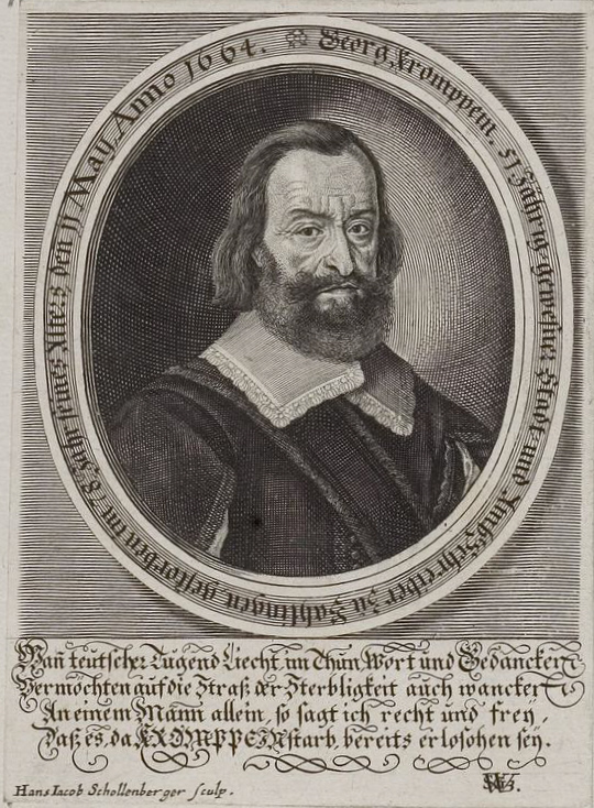 Georg Kromppein († 1664), Stadt- und Amtsschreiber zu Balingen. Grafik aus dem Klebeband Nr. 3 der Fürstlich Waldeckschen Hofbibliothek Arolsen. In dritter Ehe verheiratet mit Sabine Kromppein, geb. Welling. „Georg Kromppein. 51Jährig gewesner Stadt= und AmbtSchreiber zu Bahlingen, gestorben im 78. Jahr seines Alters, den 11 May, Anno 1664.“ – Unter dem Bild 4 deutsche Alexandriner, bezeichnet [verschlungenes Monogr.] „SGWB“: Wann teutscher Tugend Liecht, im Thun, Wort und Gedancken, Vermöchten auf die Straß der Sterbligkeit auch wancken, An einem Mann allein, so sagt ich recht und frey, Daß es, da KROMPPEIN starb, bereits erloschen sey. GND: 1019728639